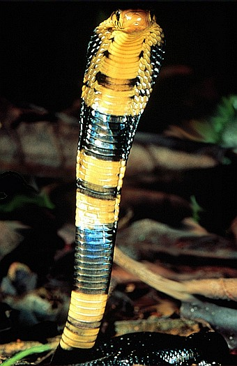 Чёрно-белая кобра (Naja melanoleuca)